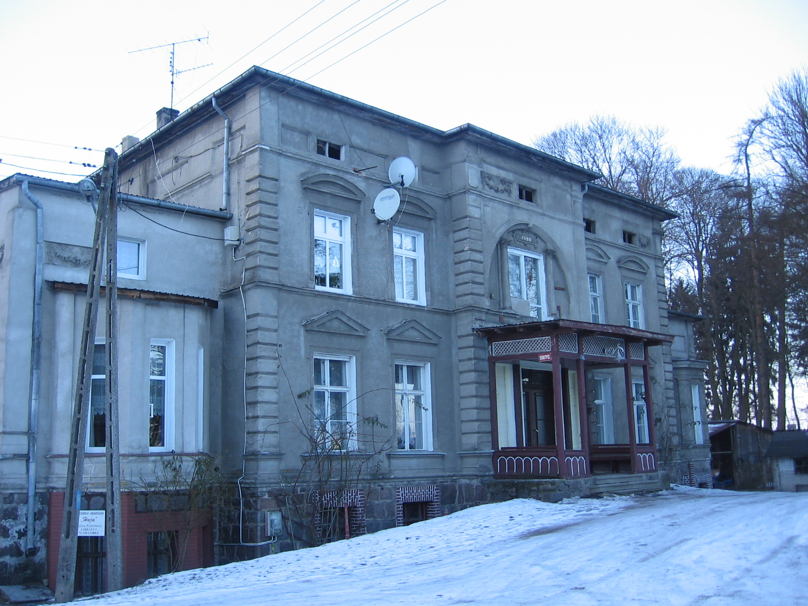 Dworek w Łobżanach